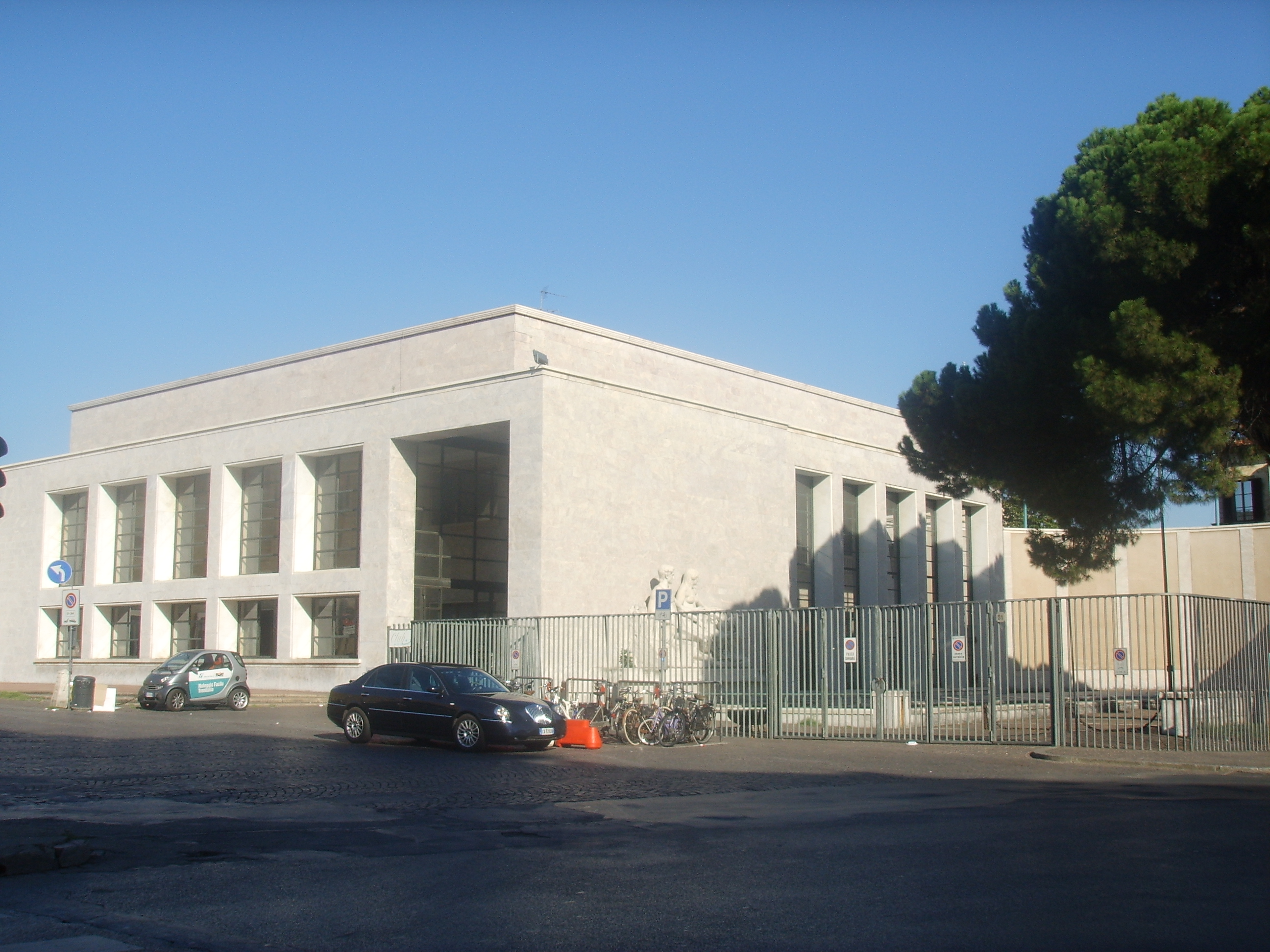 Palazzina stazione SMN11